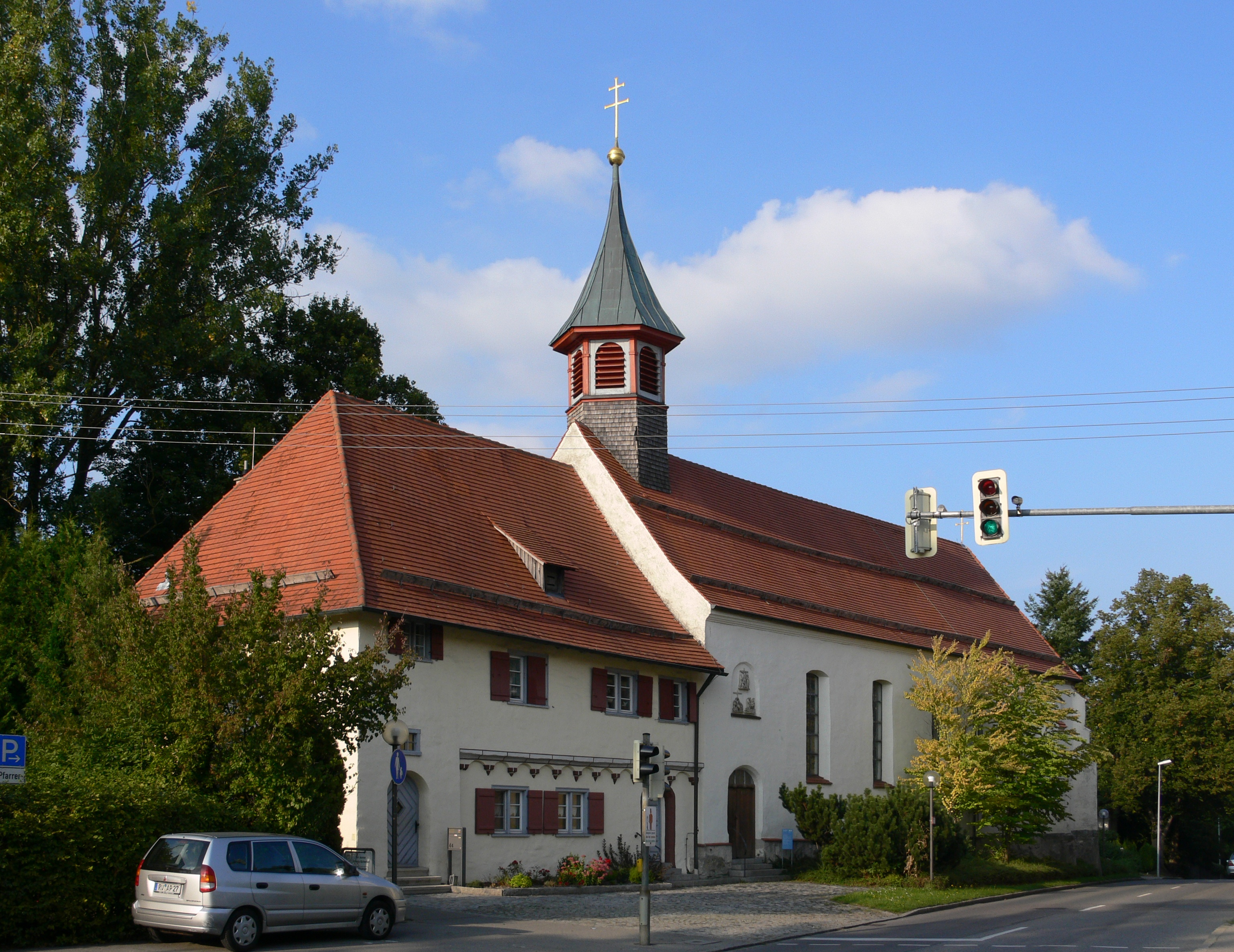 Frauenbergkirche, Bad Waldsee Meßnerhaus und Frauenbergkirche